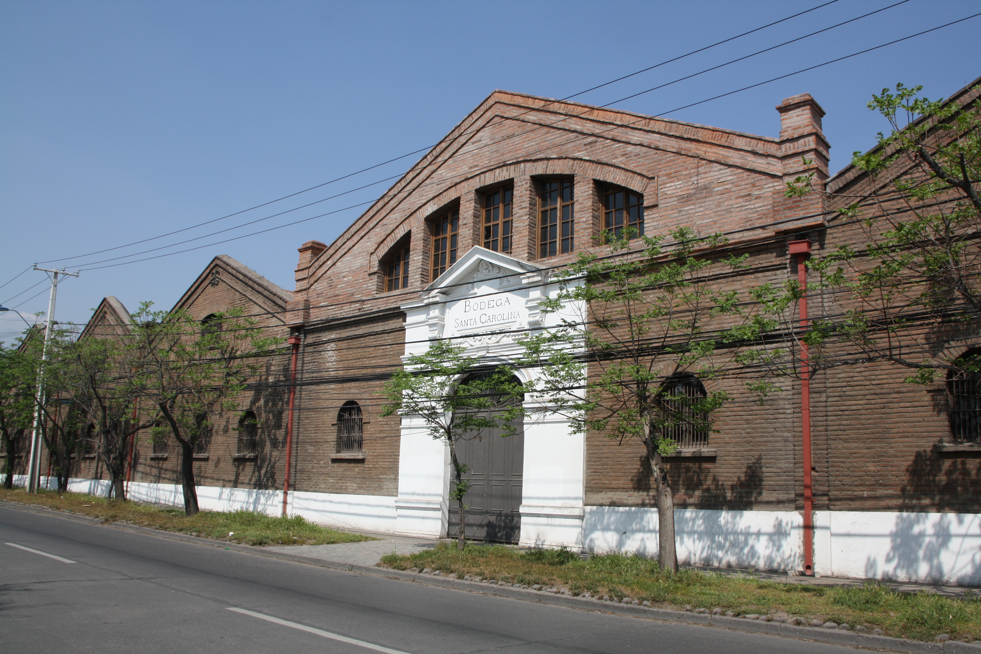 Bodegas de la viña Santa Carolina This is a photo of a national monument in Chile: 1252